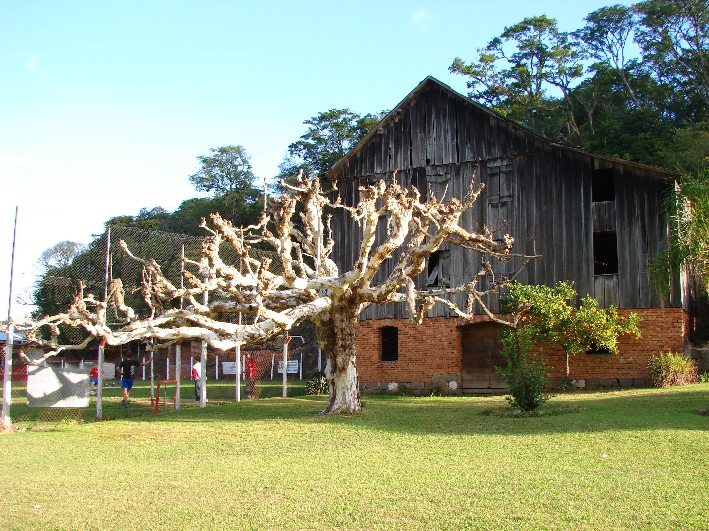 Um pouco do Vale dos Vinhedos